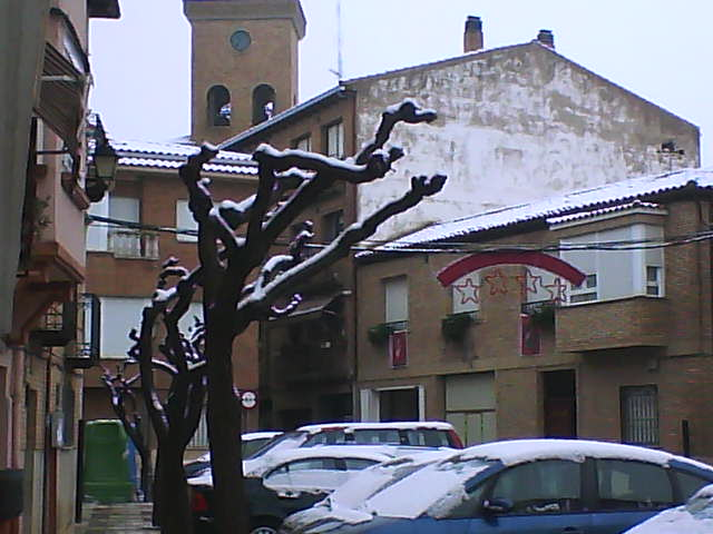 Postigo plaza.